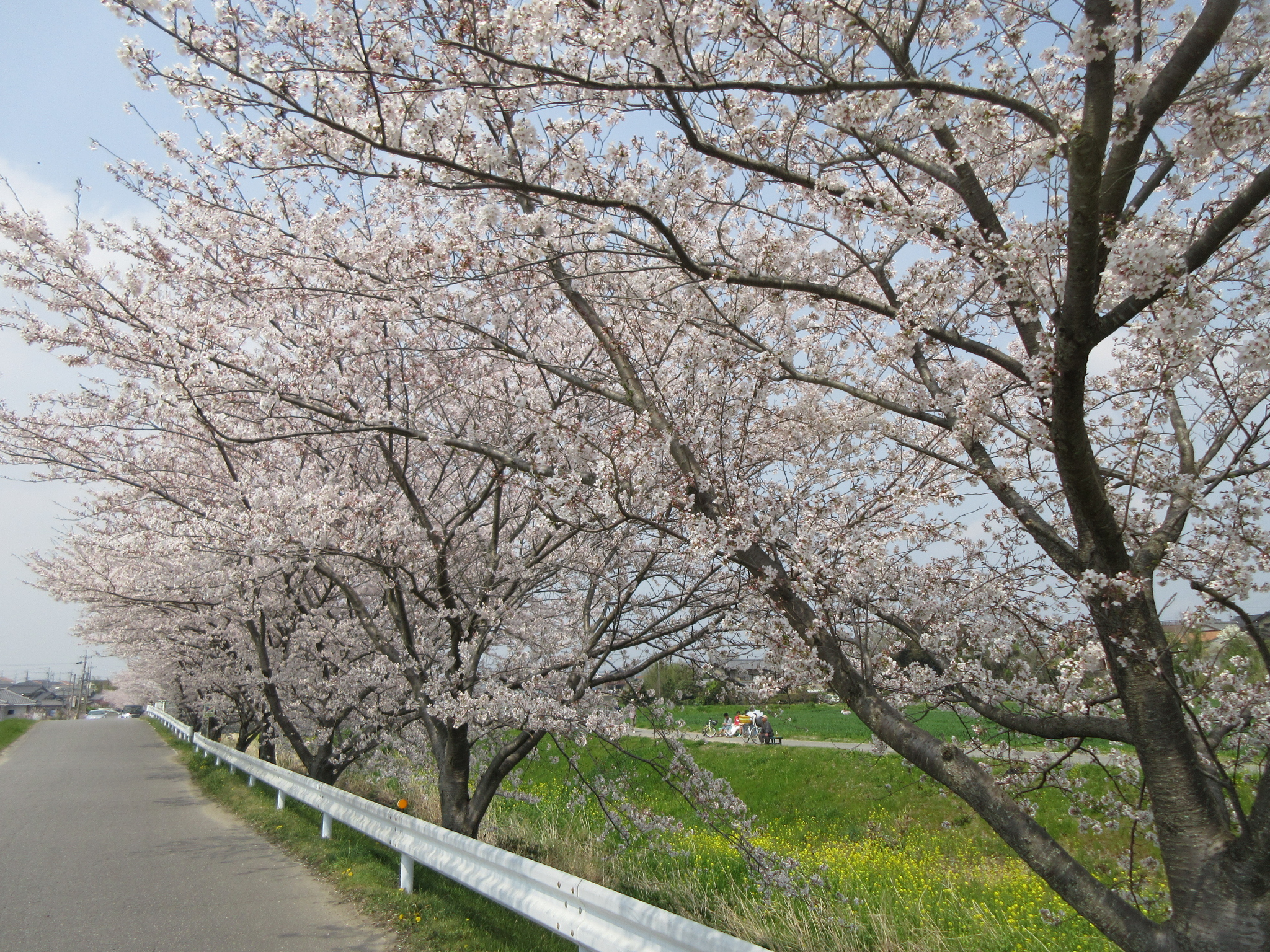 竜泉寺川（岡崎市竜泉寺町）